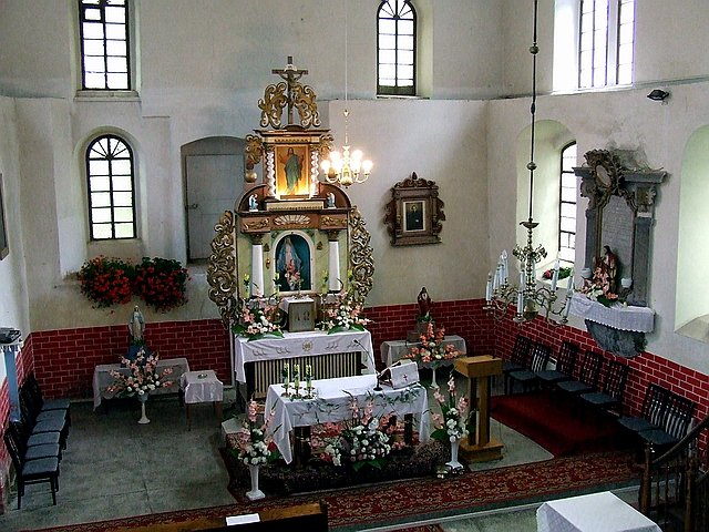 Widok wnętrza kościoła Niepokalanego Poczęcia Najświętszej Marii Panny w Raszowej